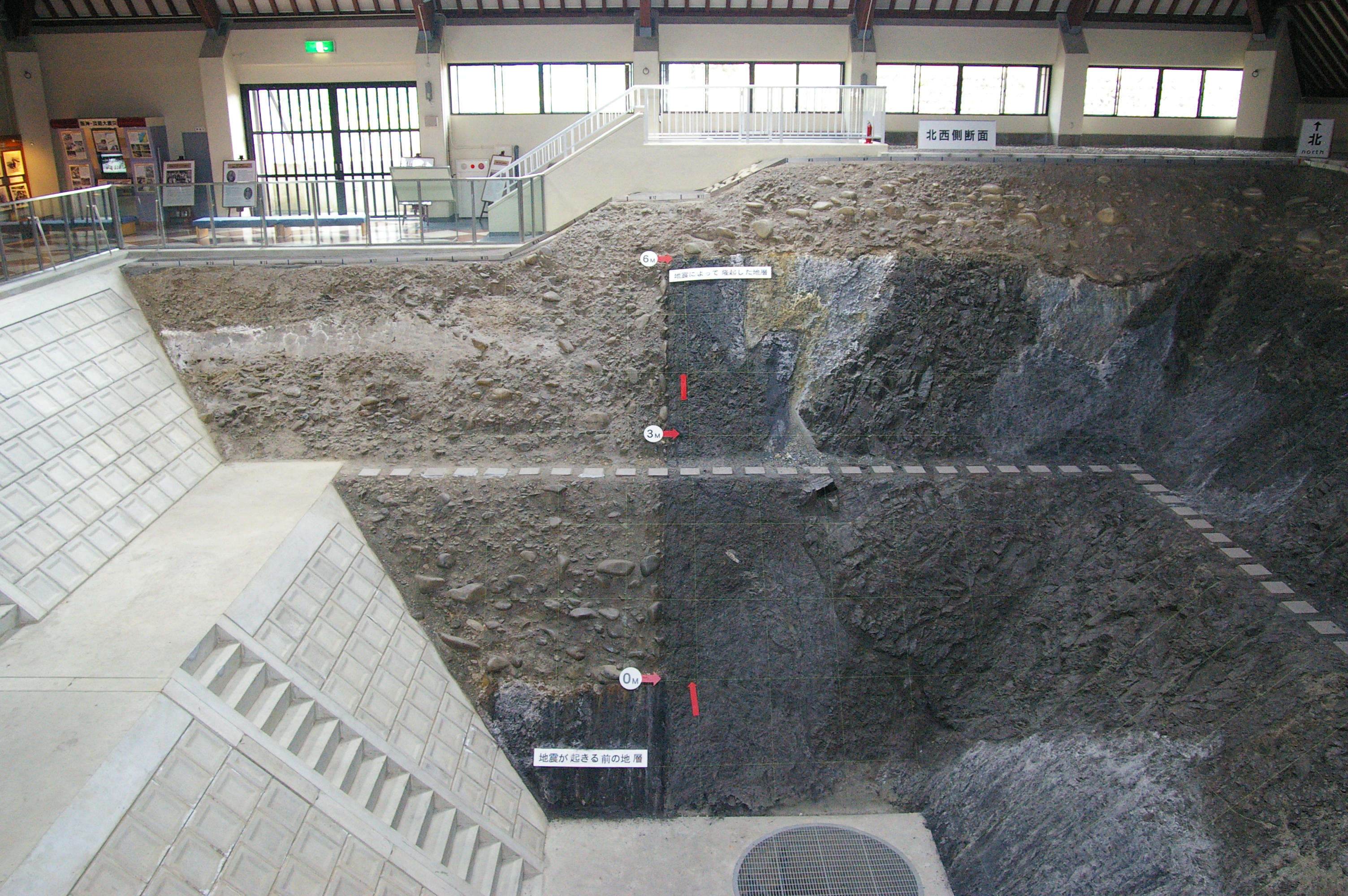 根尾谷断層水鳥断層崖のトレンチ壁面（根尾谷地震断層観察館）